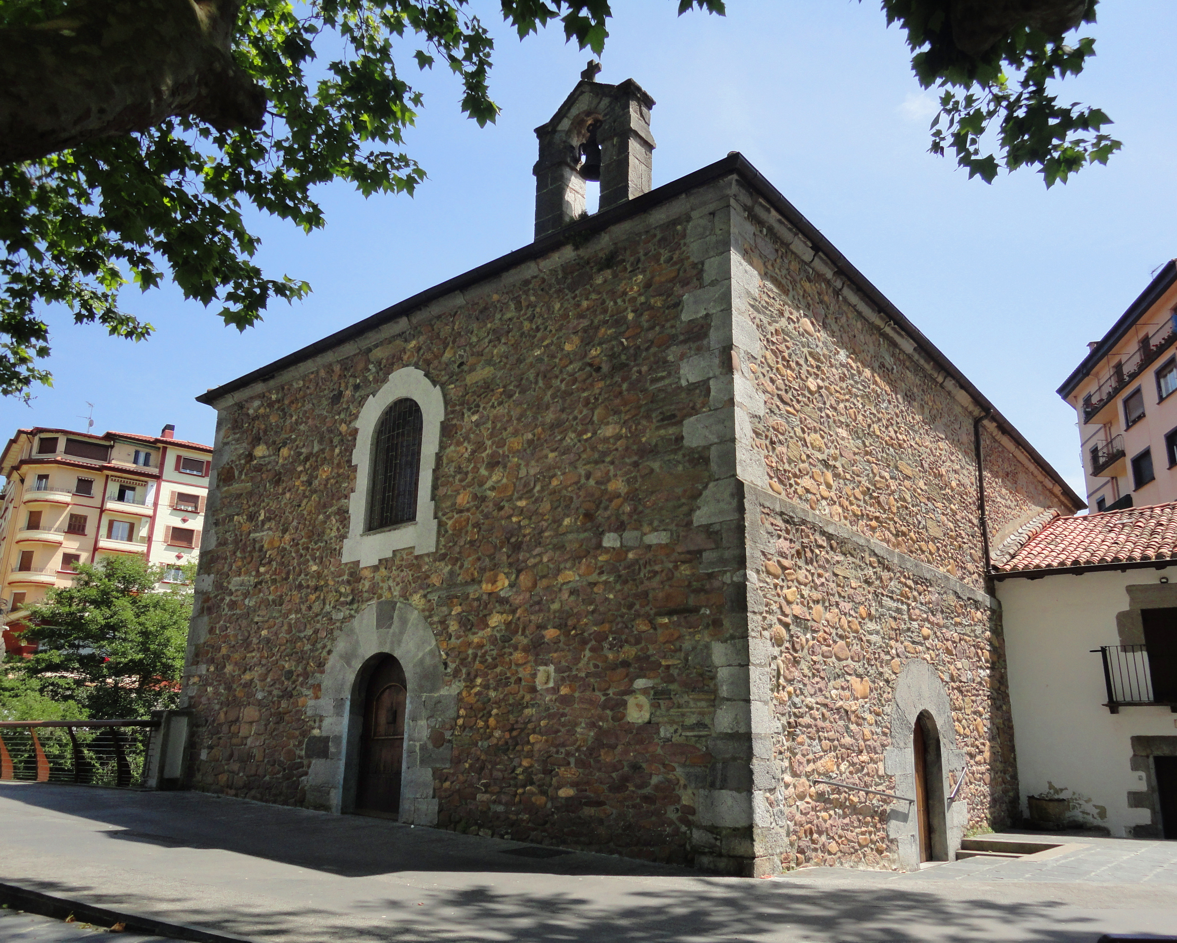 Santa Krutz ermita - Andoain